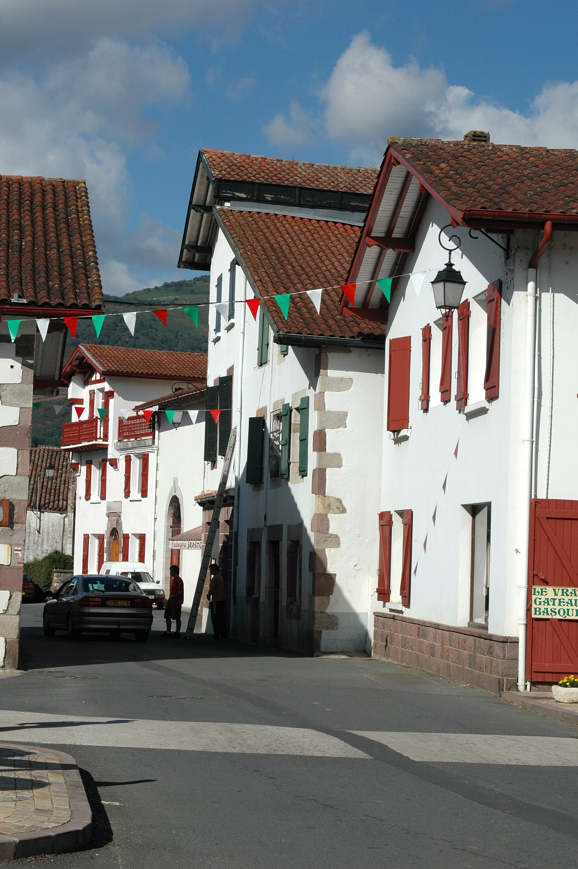 Saint-Étienne-de-Baïgorry, rue principale. Photo prise le 03/08/06 par Harrieta171